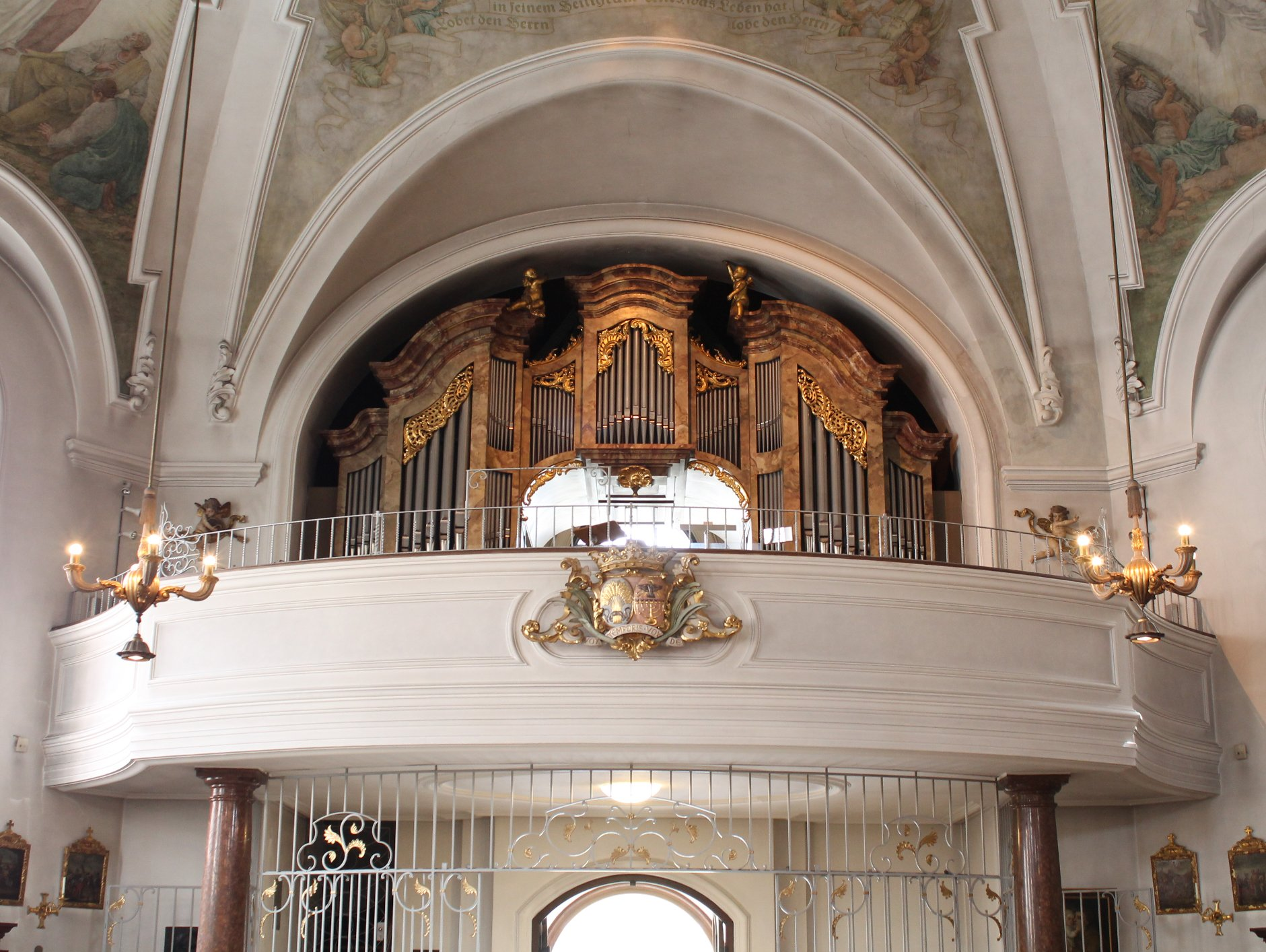 Orgel von St. Sylvester in München (1980, Spaeth, III/30)